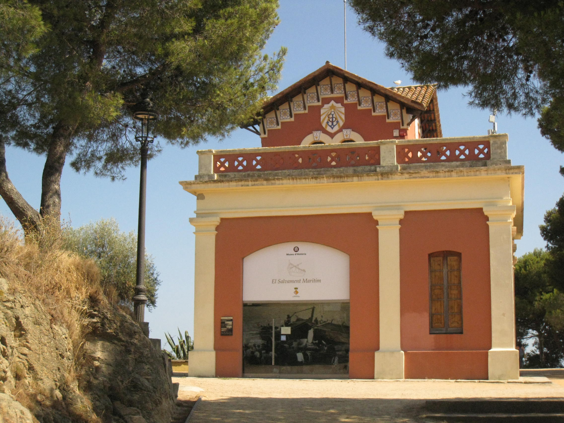 El Salvament (Sant Feliu de Guíxols)